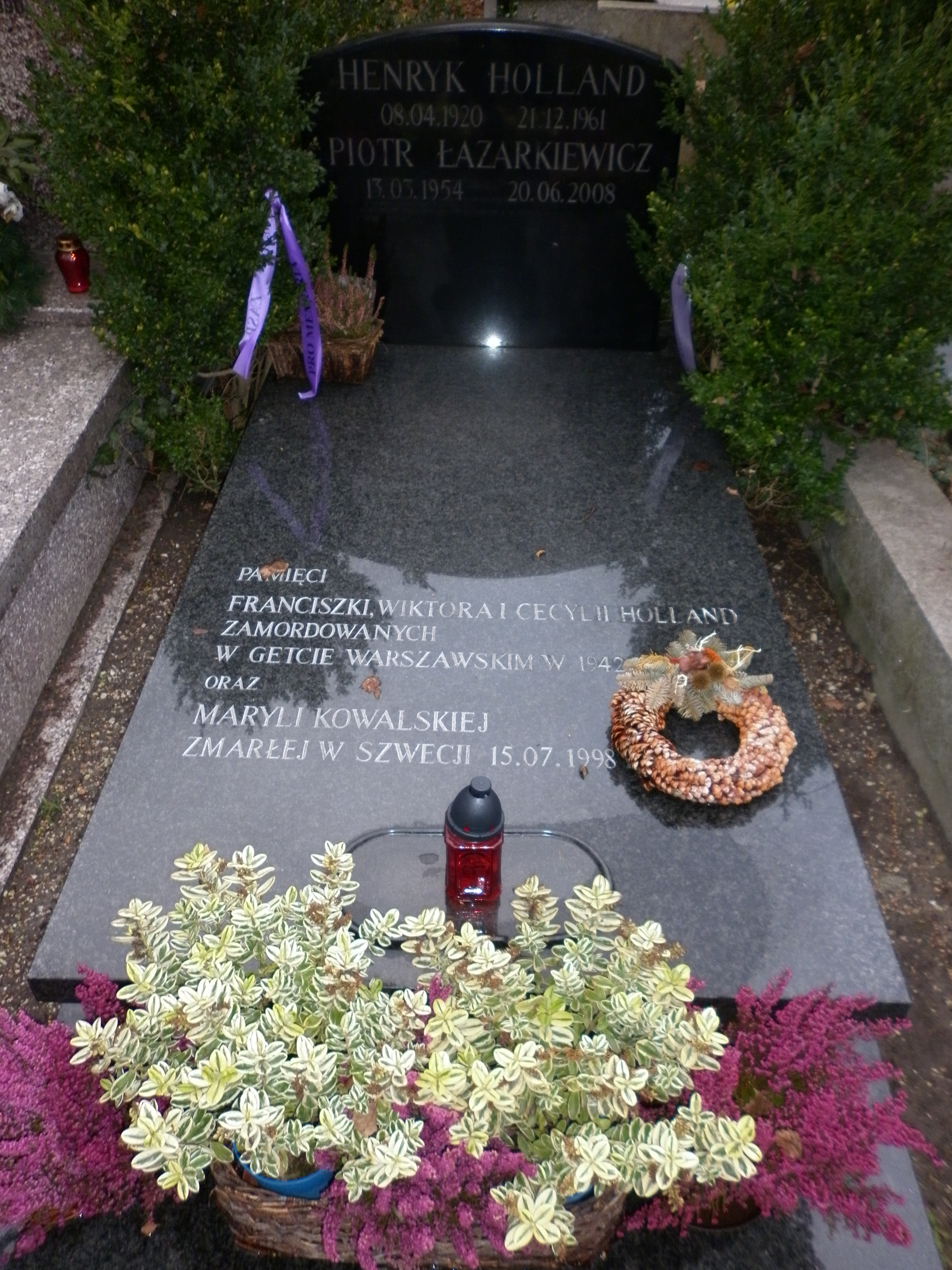 Grób Piotra Łazarkiewicza i Henryka Hollanda na Wojskowych Powązkach